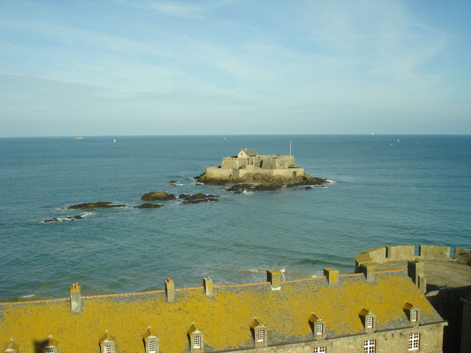 Saint-Malo Novembre 2011